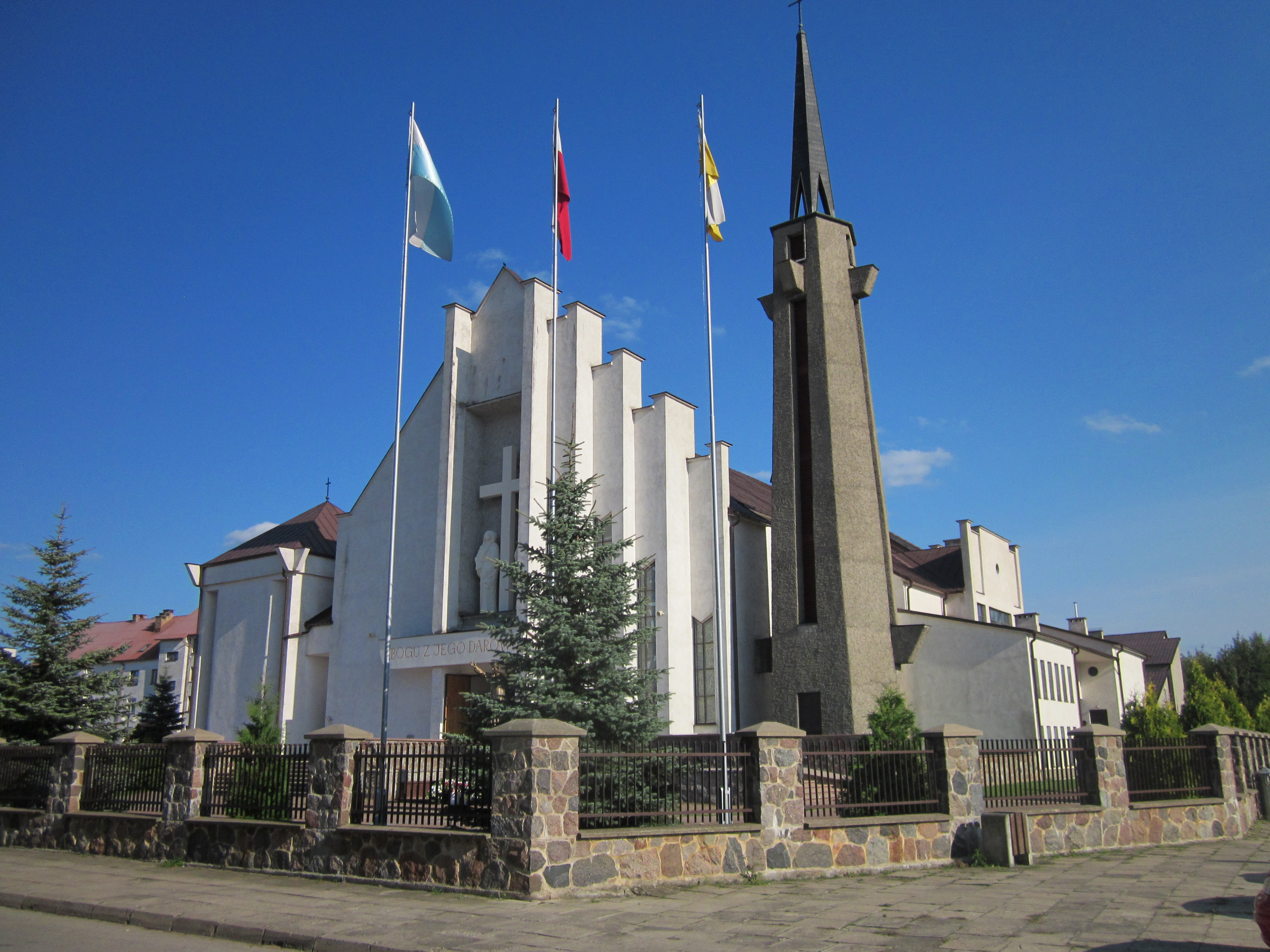 Kościół pw. NMP Matki Miłosierdzia znajduje się przy ul. Kard. Stefana Wyszyńskiego 5.